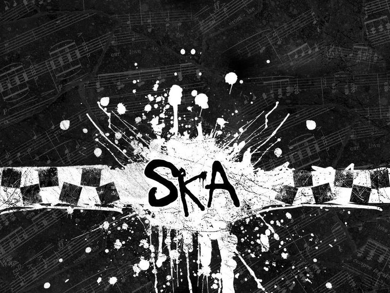 papel tapiz